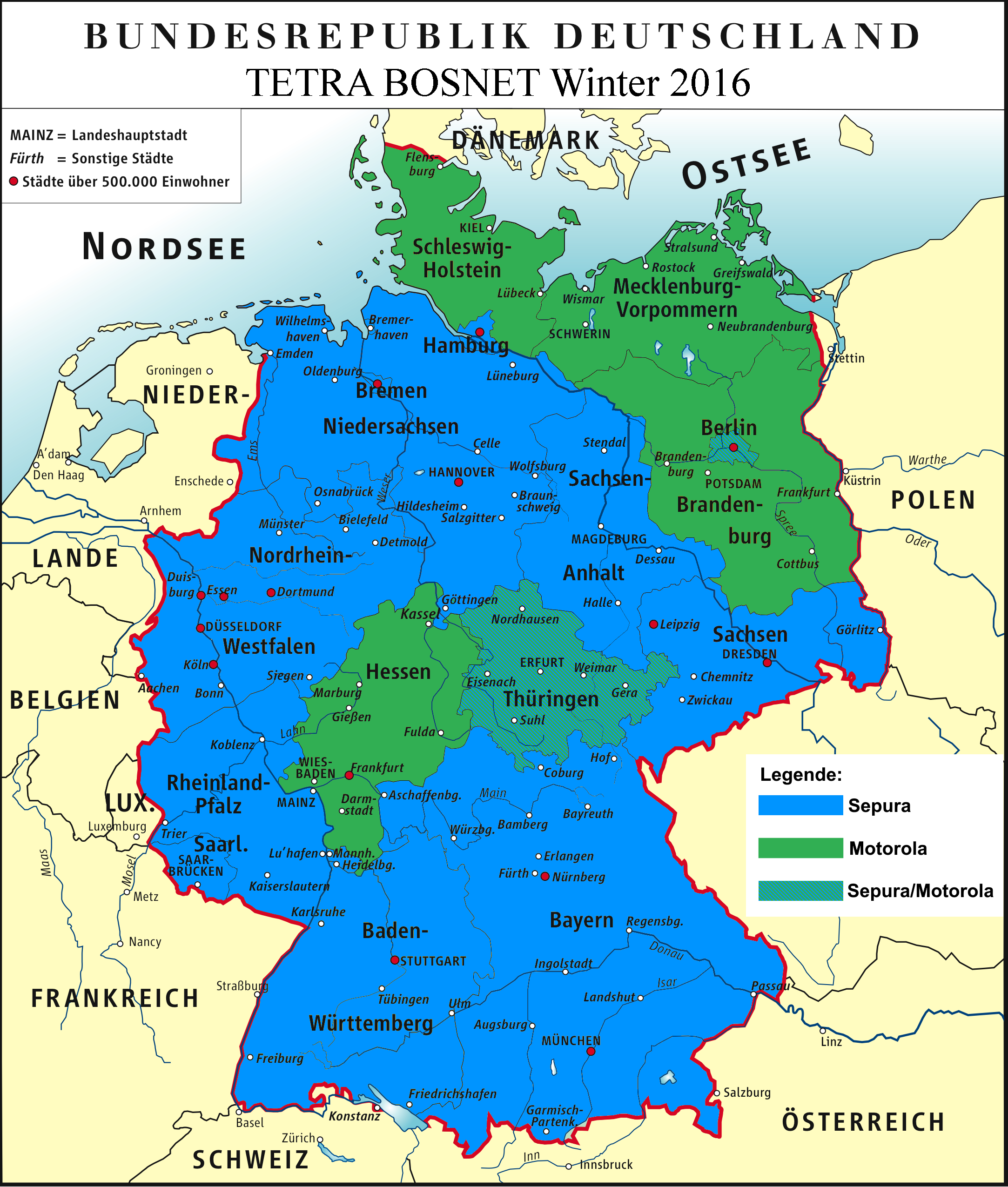 Ausstattung der Länder mit Digitalfunkendgeräten im Winter 2016